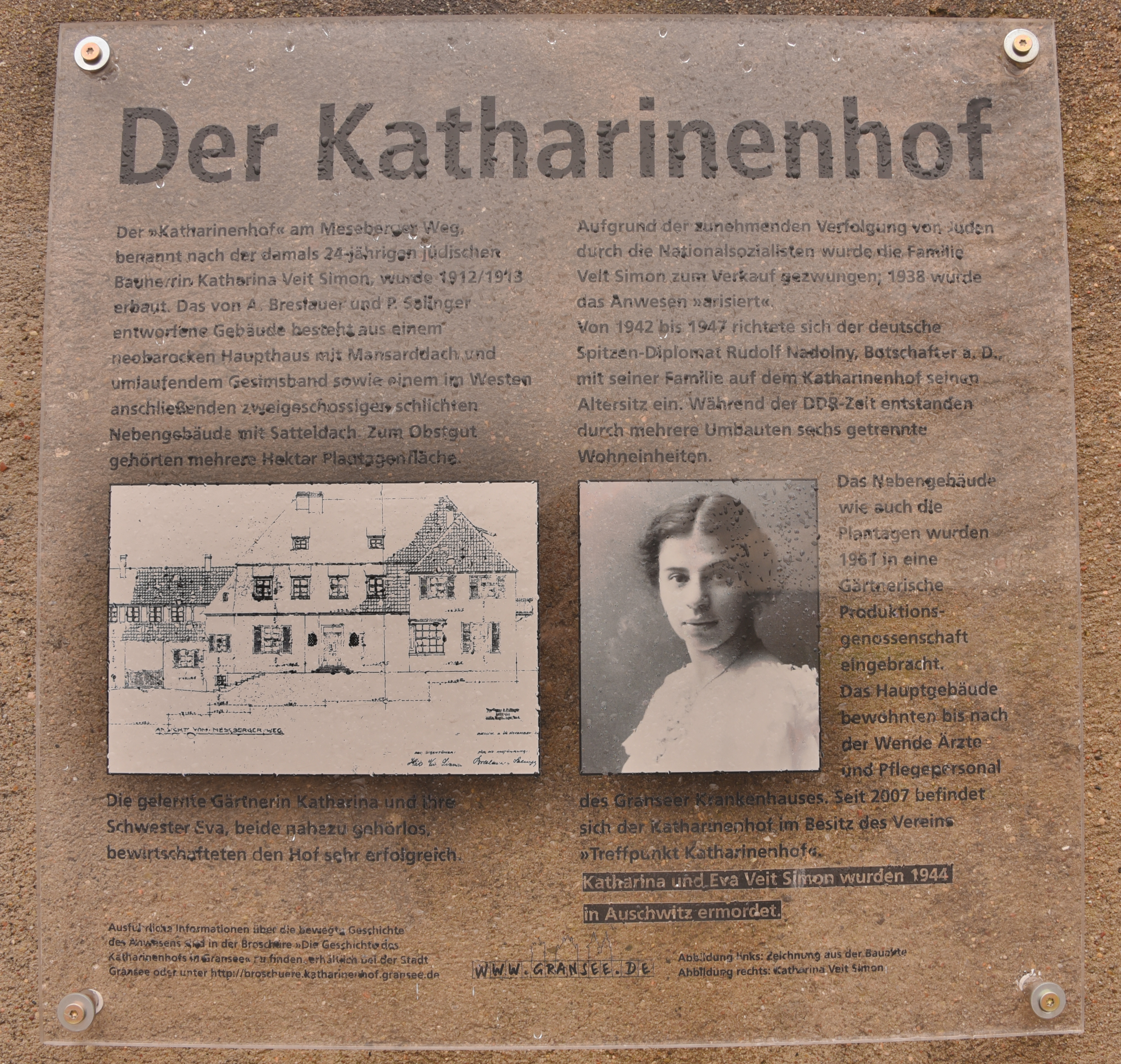 Gedenktafel Katharinenhof